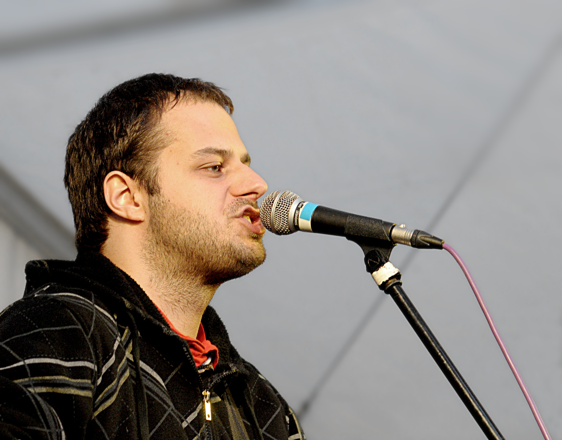 Xindl X na koncertě v Opavě